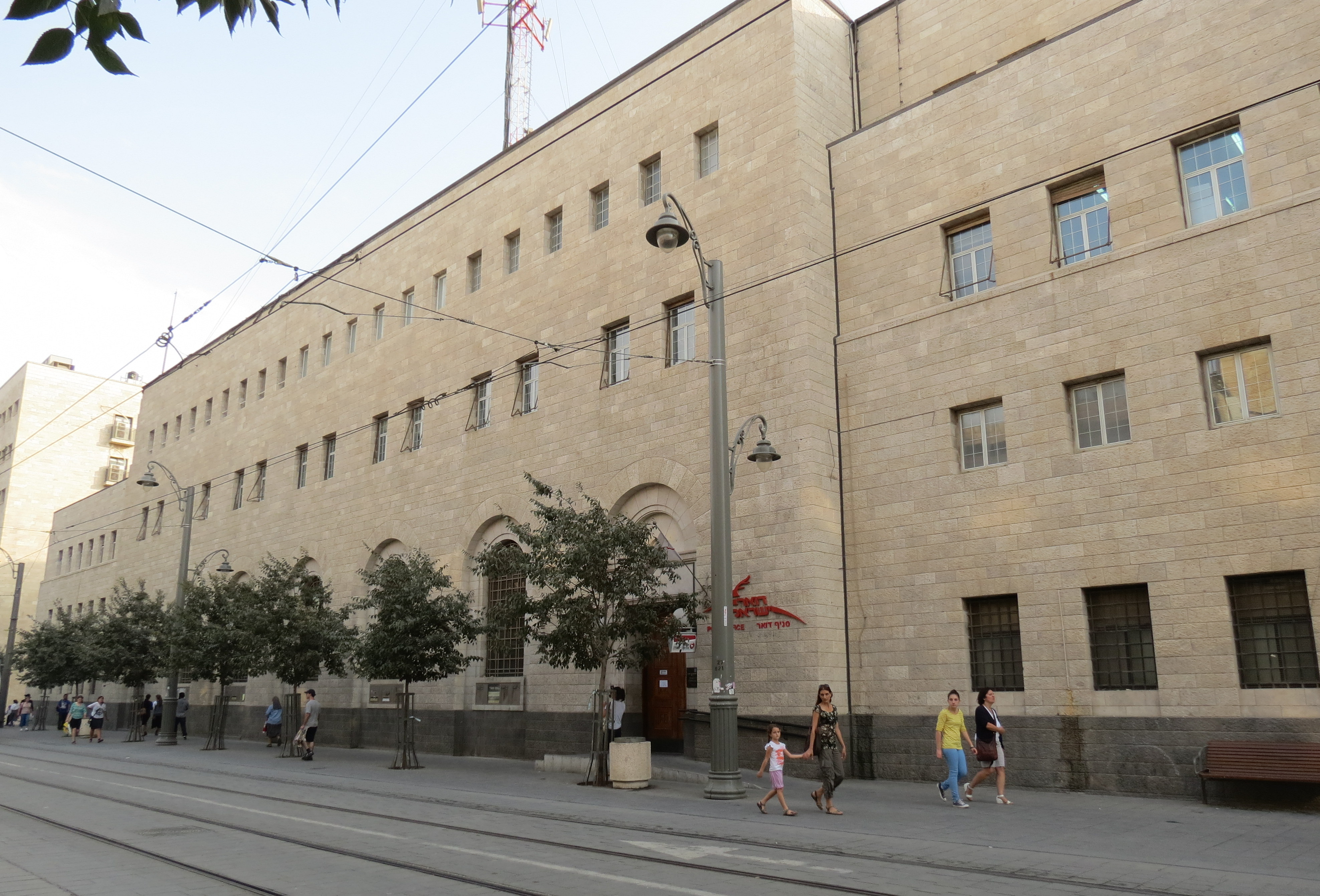 סניף בית דואר בעיר העתיקה מול מגדל דוד. שימש למעבר דואר עם הממלכה האוסטרית. בית הדואר האוסטרי היה החשוב בירושלים בעיקר בשל מהימנותו.